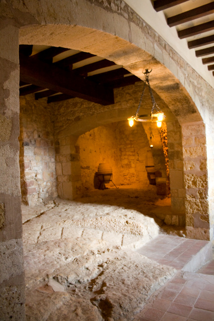 Interior castell del Papiol a la comarca del Baix Llobregat - Catalunya